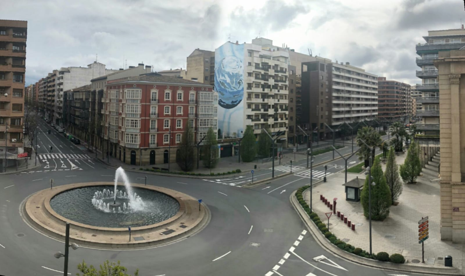 Logrono en cuarentena (04-01) Calle Vara de Rey y Gran Via